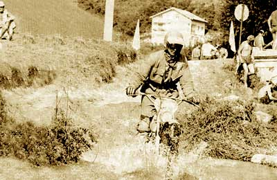 1974 Mezinárodní motocyklová šestidenní Camerino, Itálie